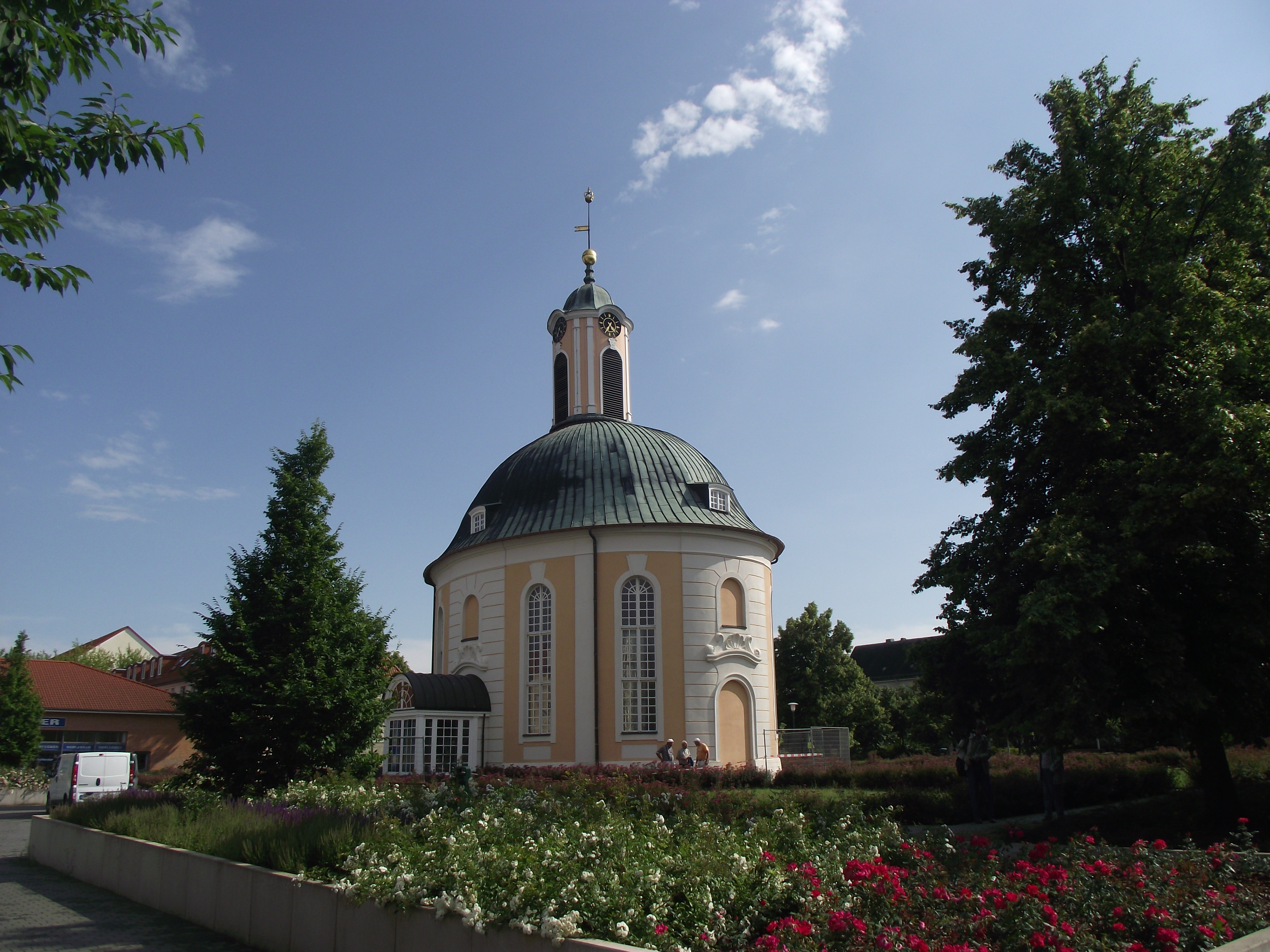 Schwedt - sala koncertowa